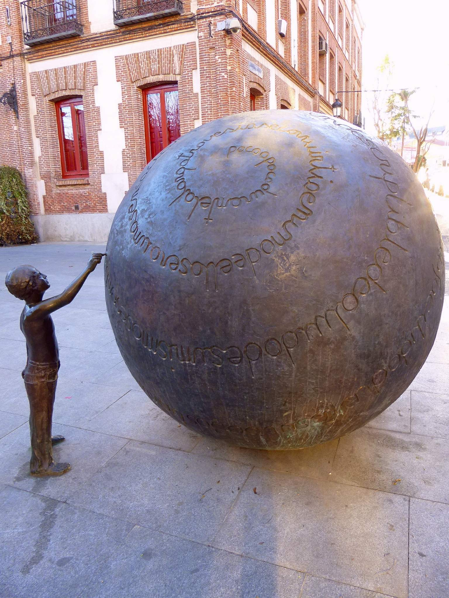 Barrio de Puerta Bonita, Distrito de Carabanchel (Madrid)